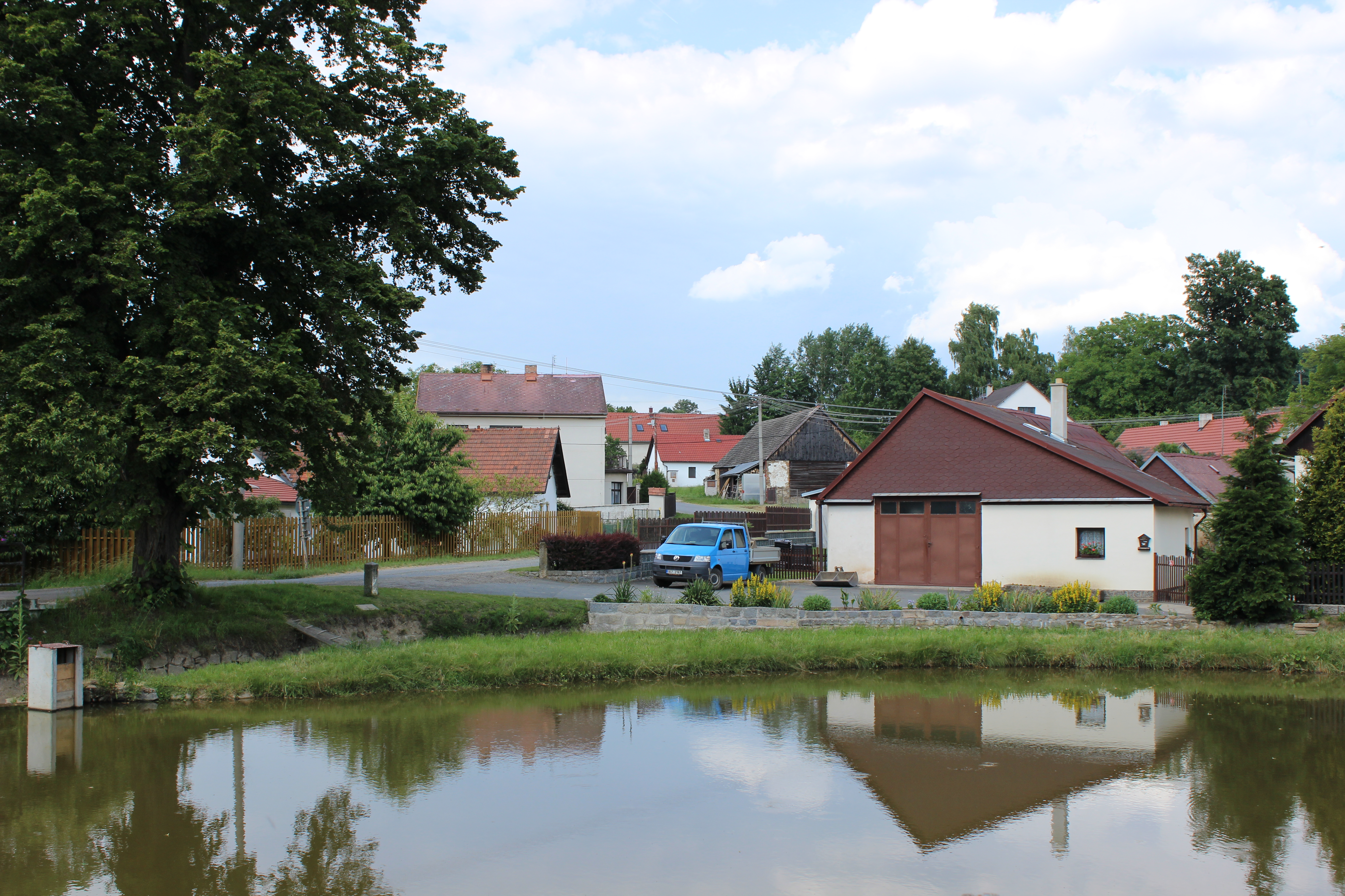 Zástavba v Černičí (pohled od kapličky severovýchodním směrem).